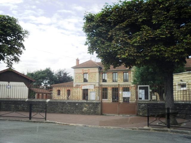 L'école privée Notre-Dame de Draveil (91)